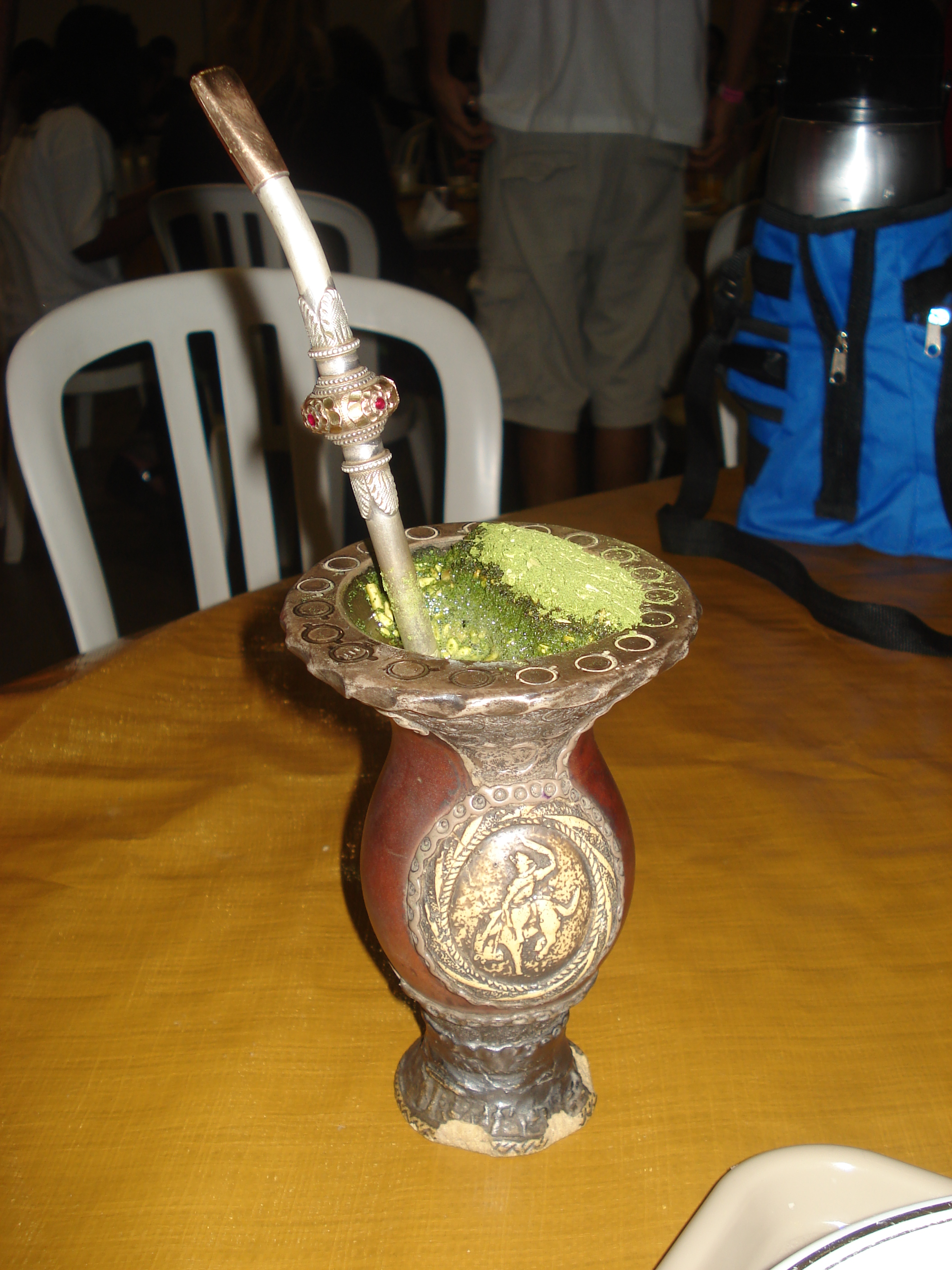 Cuia de chimarrão